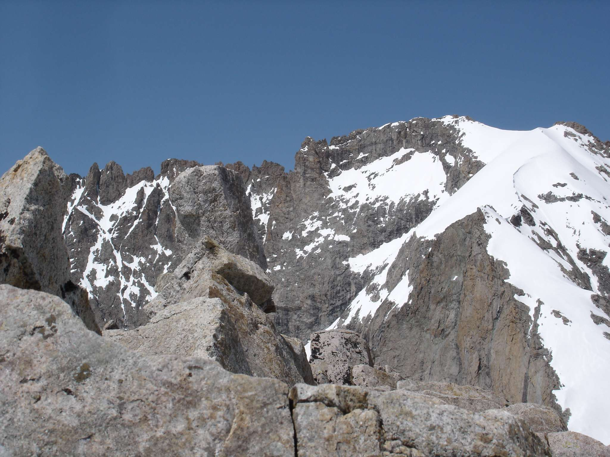 La face Sud du Rateau (3809m) dans l'Oisans, vue depuis le sommet de la Tête Nord du Replat. Photo prise en juin 2005.